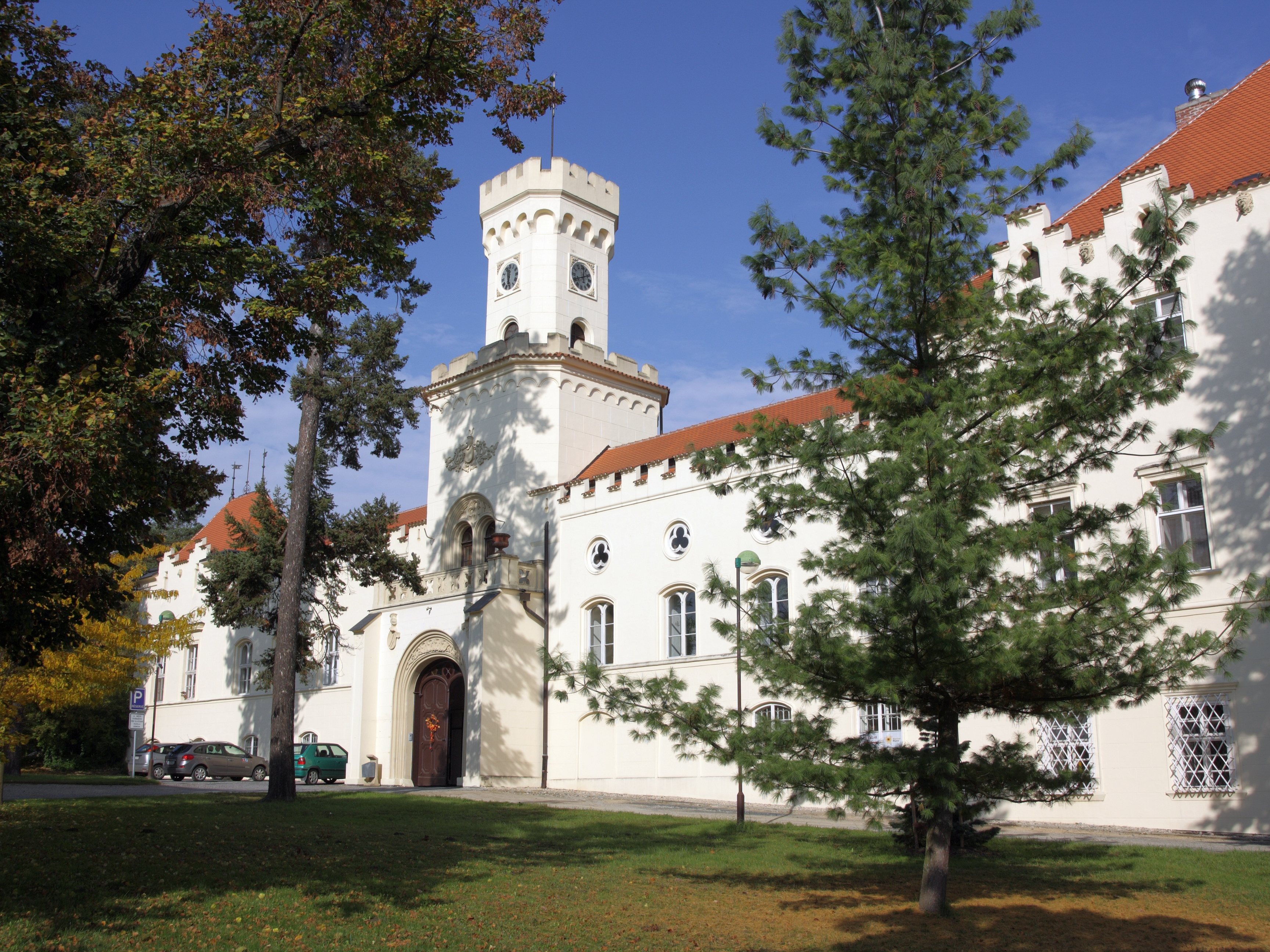 Sokolnice - zámek, hlavní průčelí.